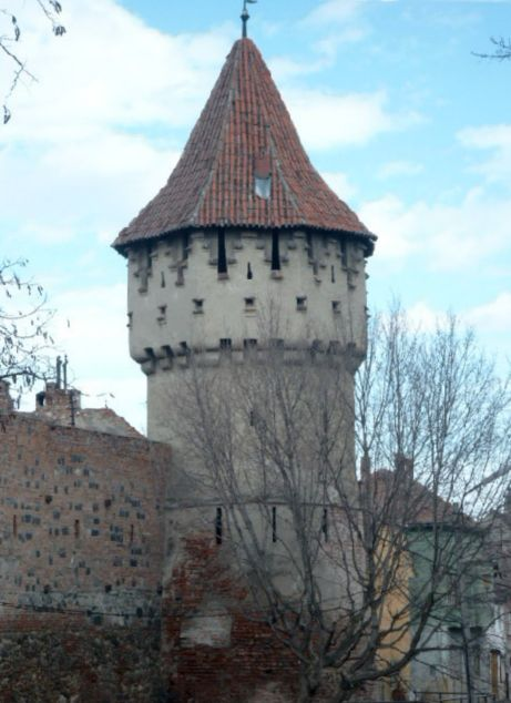 Zimmermannsturm an der Harteneckgasse in Hermannstadt (RO).